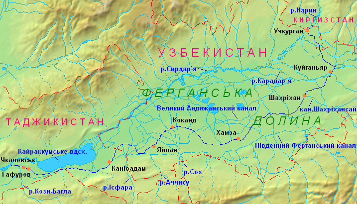 Мапа Великого Ферганського каналу